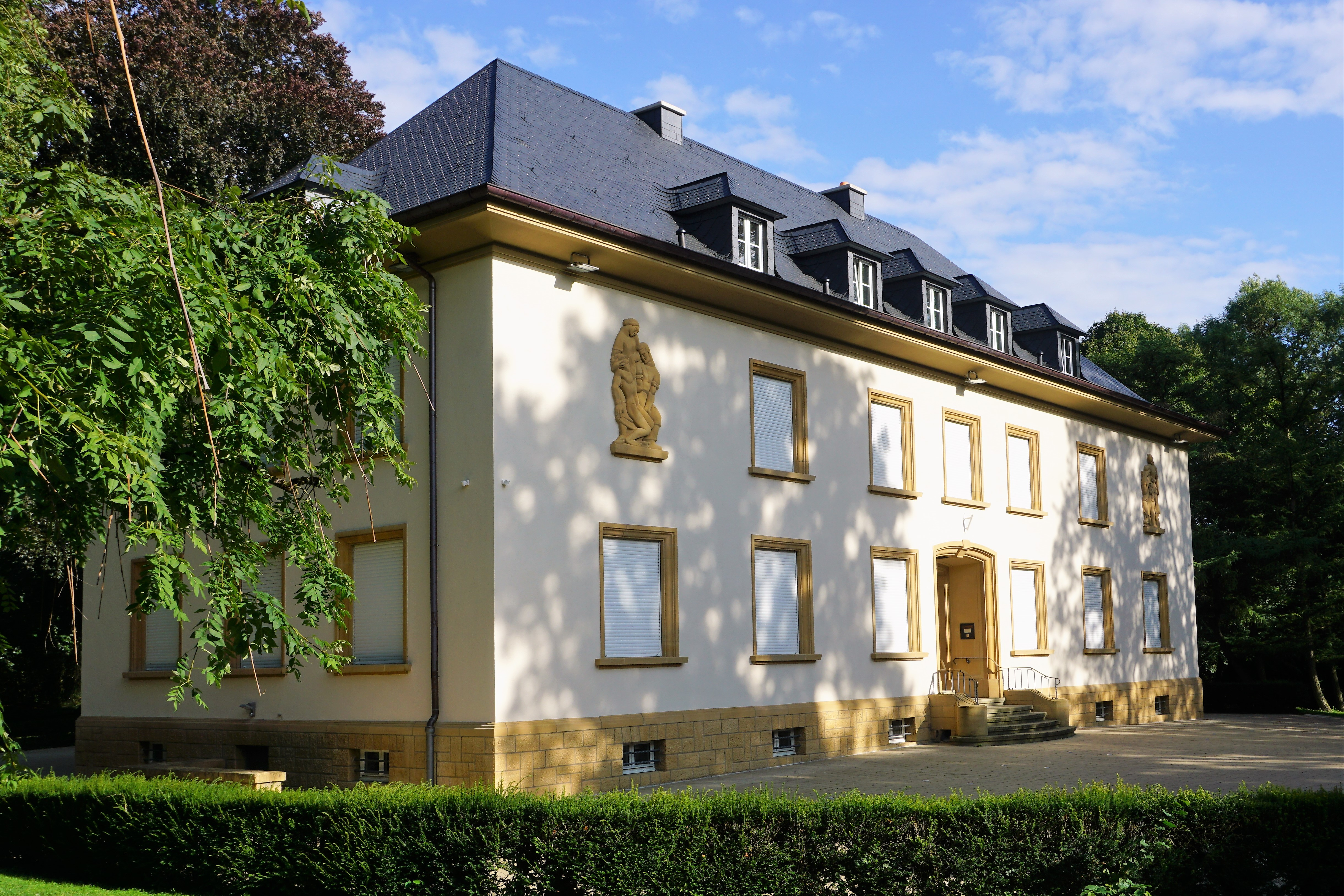 Luxembourg, siège de la Croix rouge luxembourgeoise. Parc de la Ville de Luxembourg. Face avant.